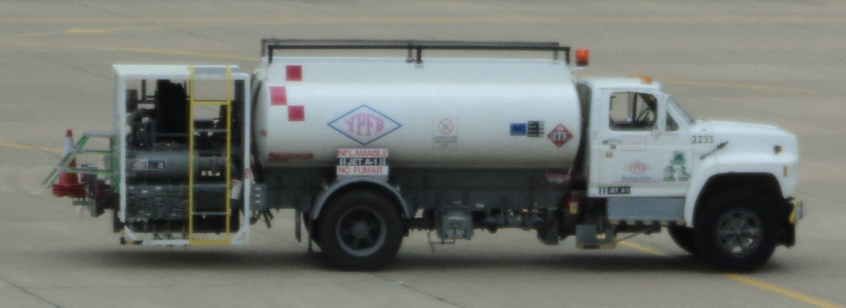 Camión Proveedor de combustible para aviones en el Aerpuerto de Tarija, Bolivia